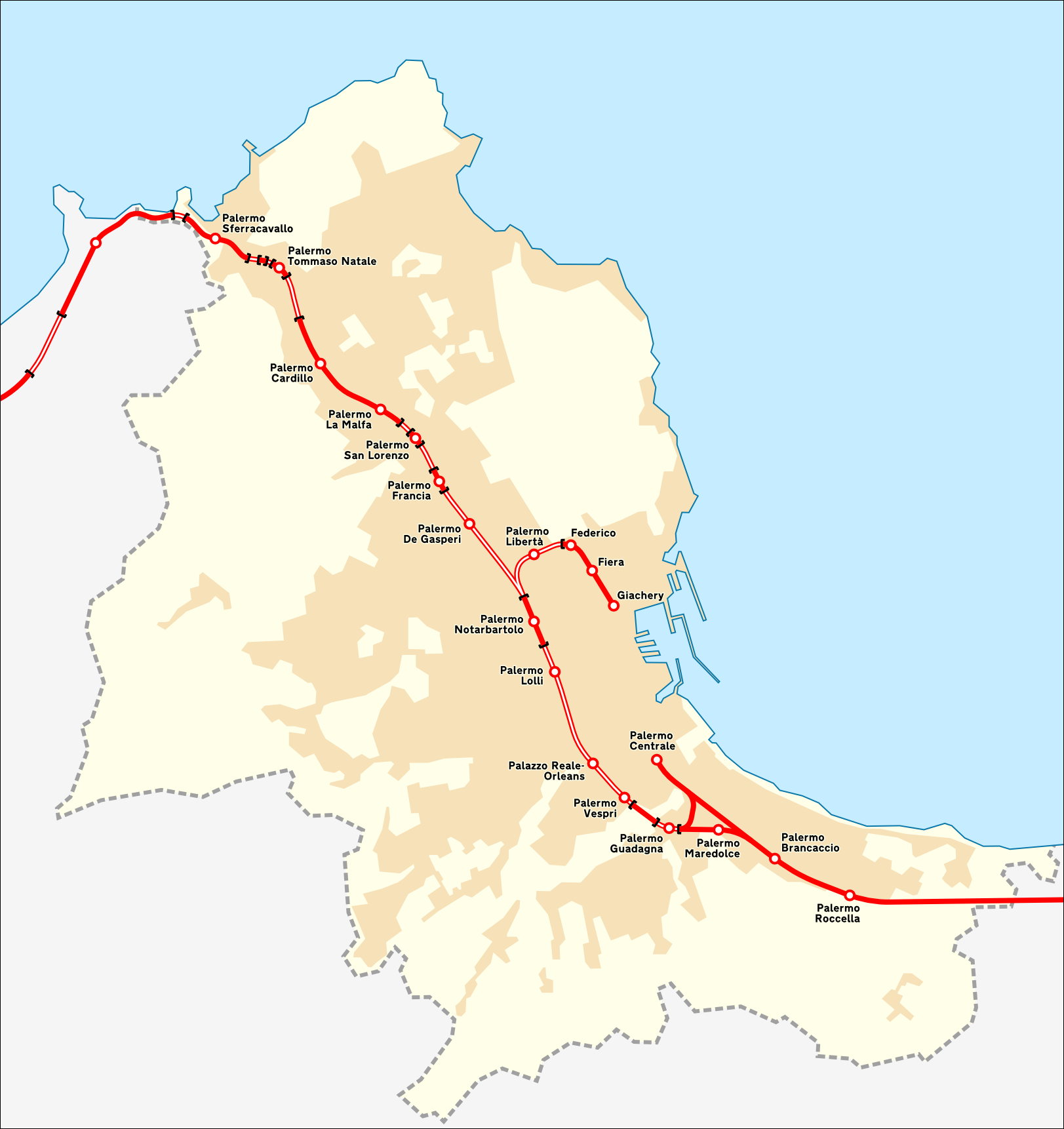 Mappa del nodo ferroviario di Palermo.